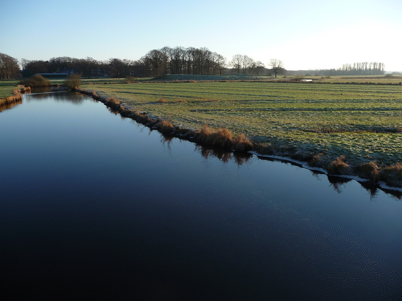 Schwedenschanze (Stade) von Norden aus gesehen